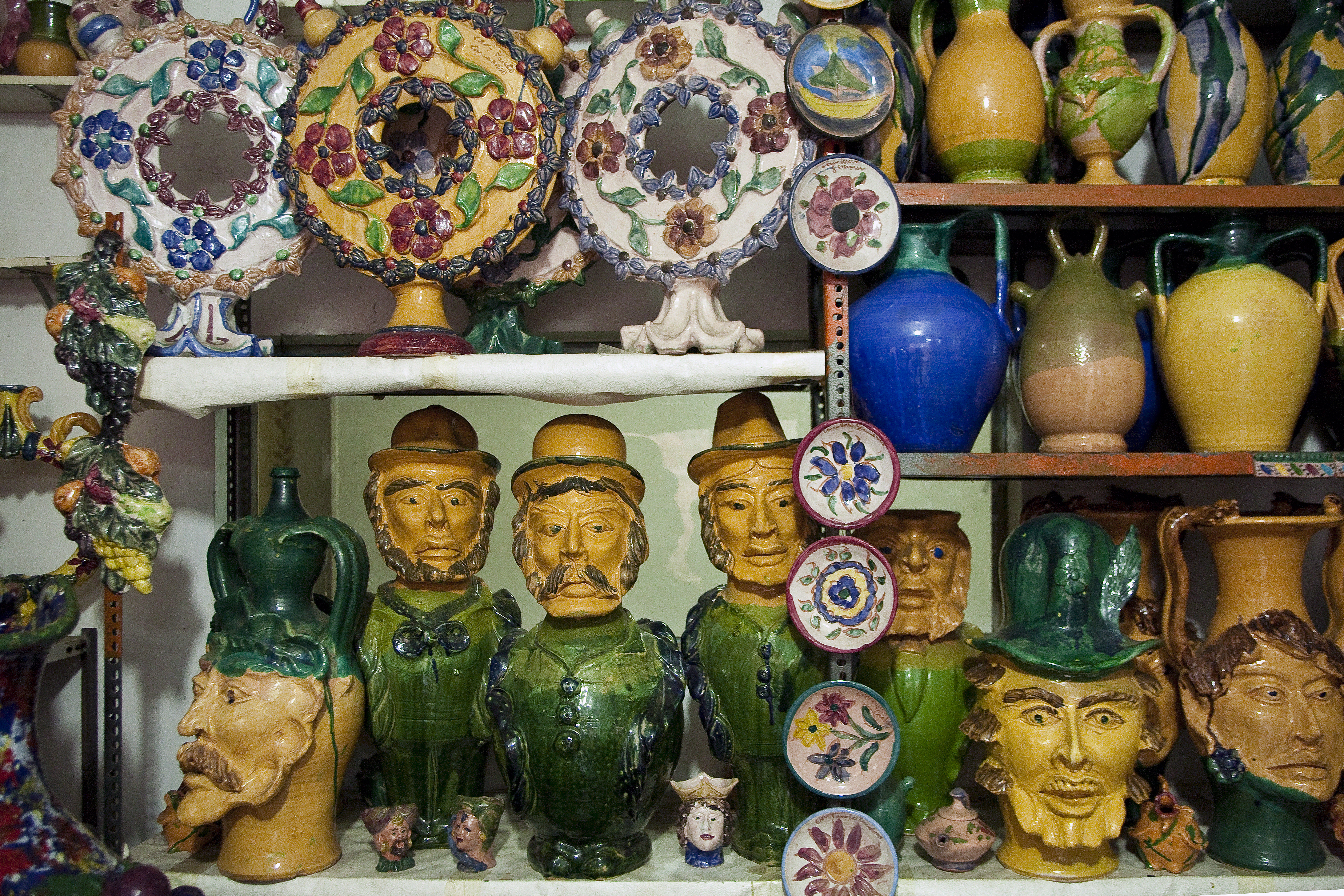 Ceramica tradizionale di Seminara - Italia